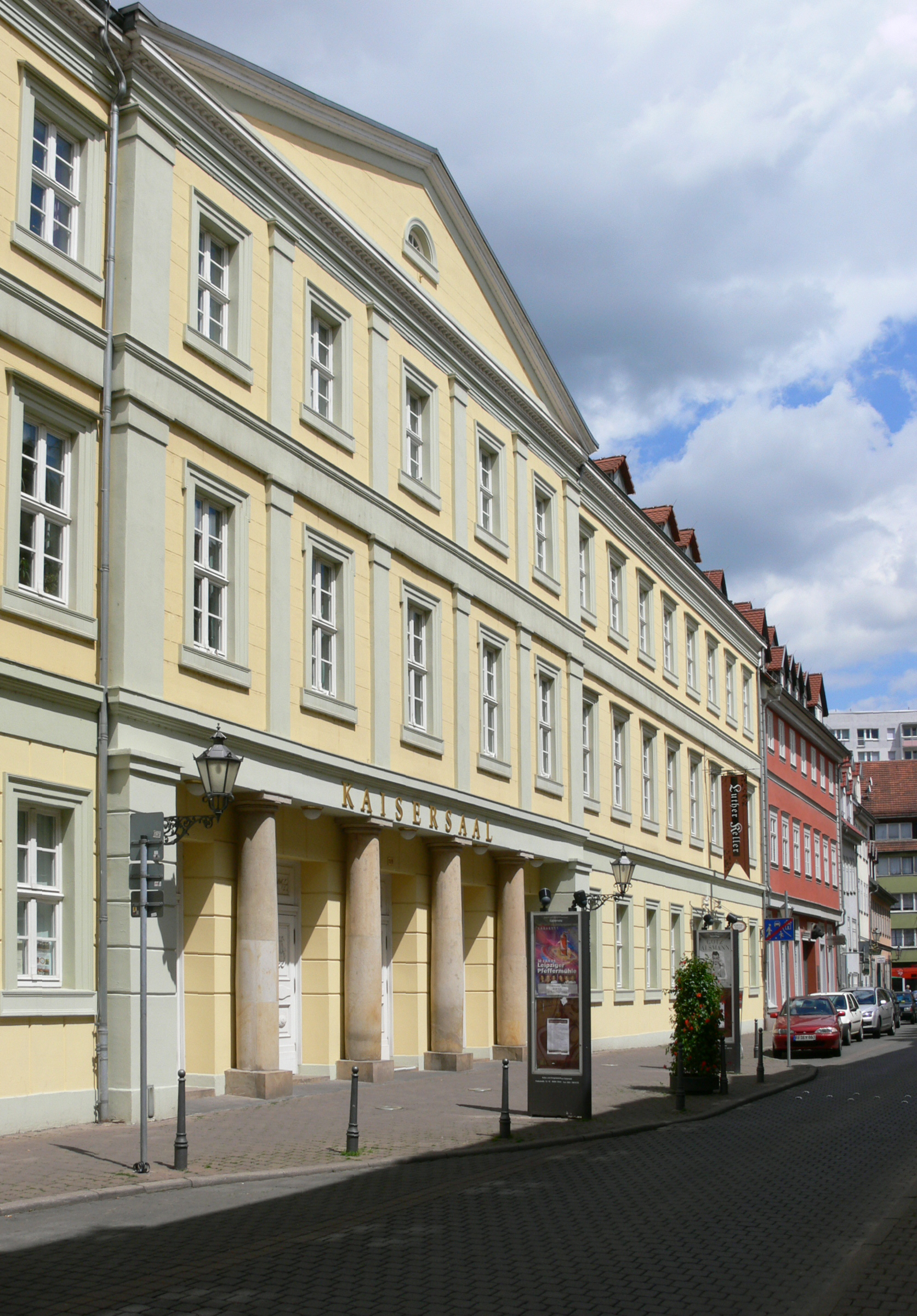 Erfurter Kaisersaal (errichtet Anfang des 18. Jahrhunderts), in der Futterstraße in Erfurt